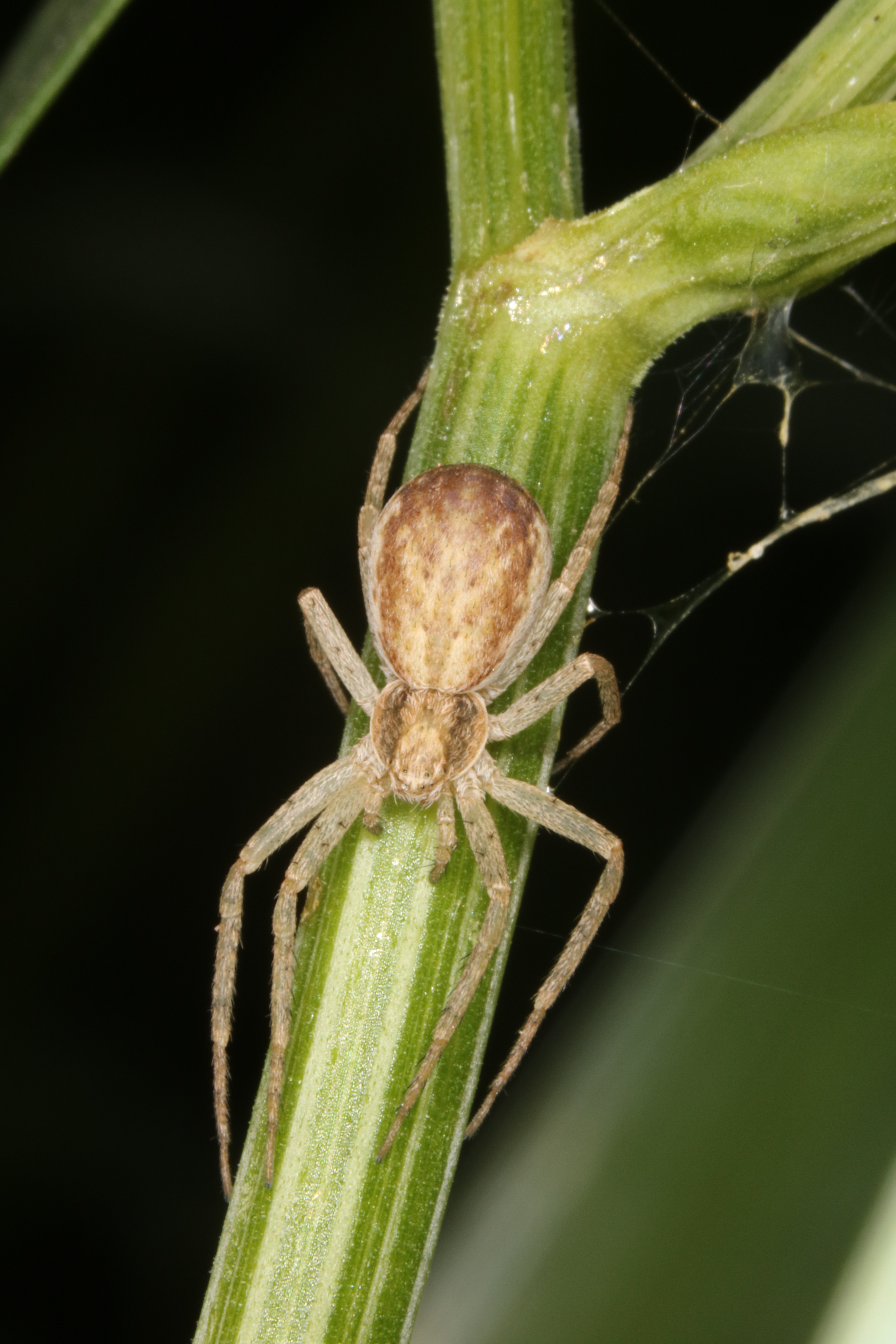 Philodromus dispar Walckenaer, 1826, female, Søborg, Denmark, 29 June 2015